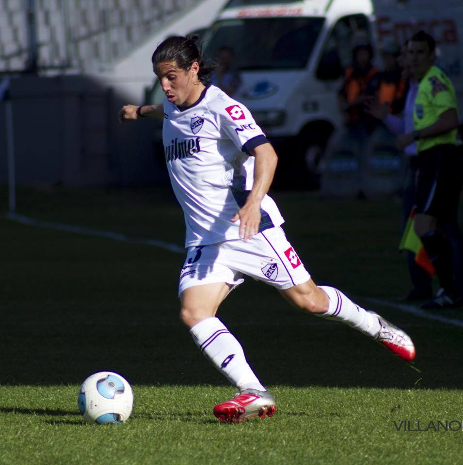 Quilmes, Argentina.